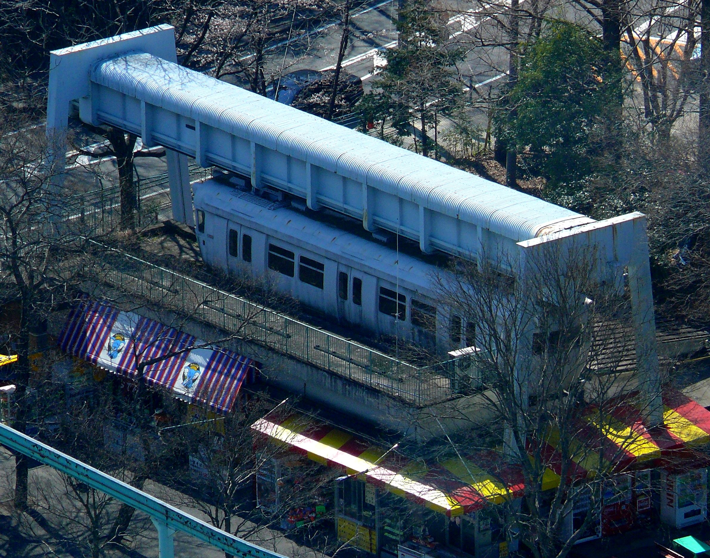 名古屋市交通局協力会東山公園モノレールの保存車(東山スカイタワー内の展望室より撮影)